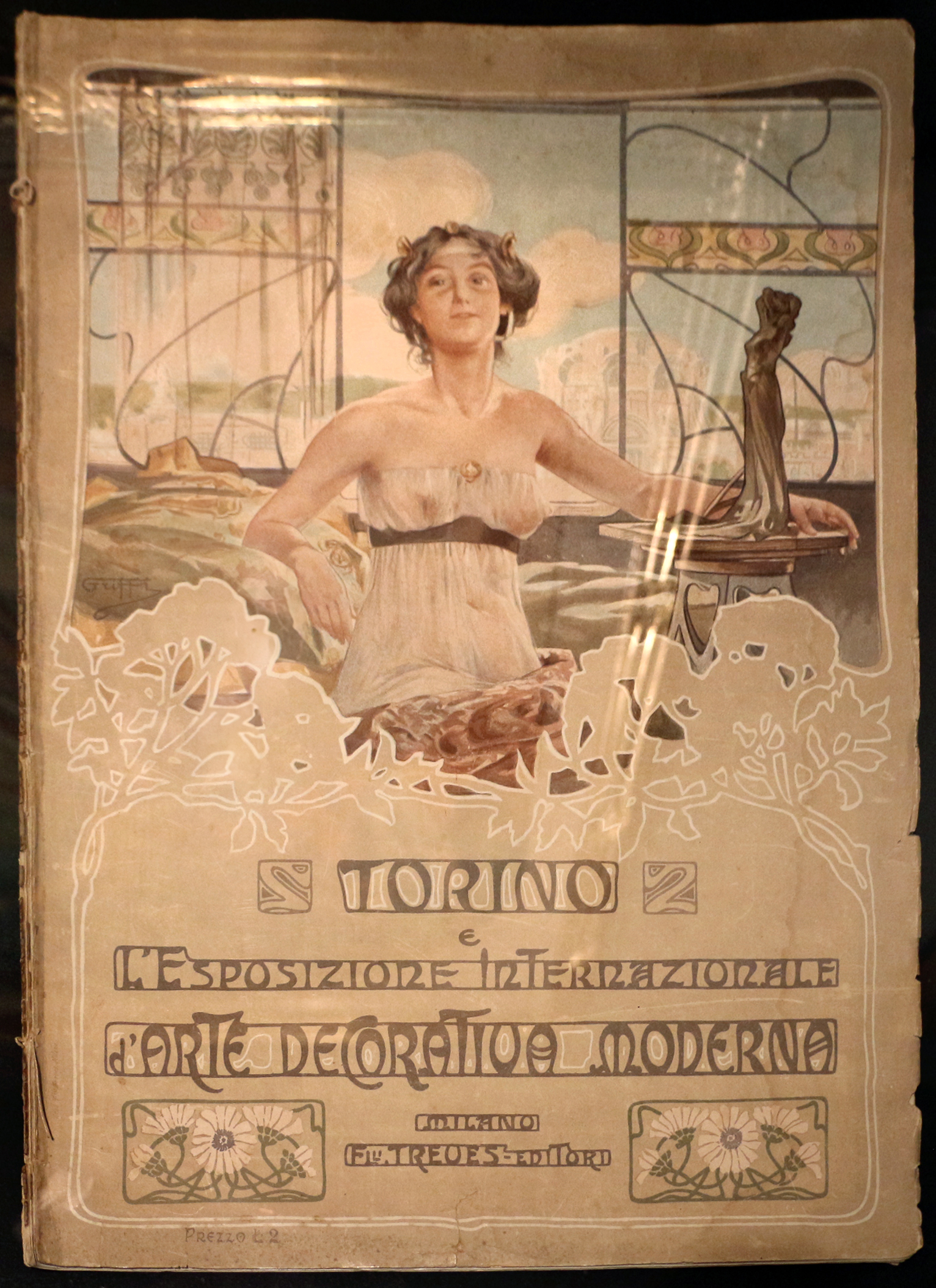 Il parco e i musei di Nervi This is a photo of a monument which is part of cultural heritage of Italy.